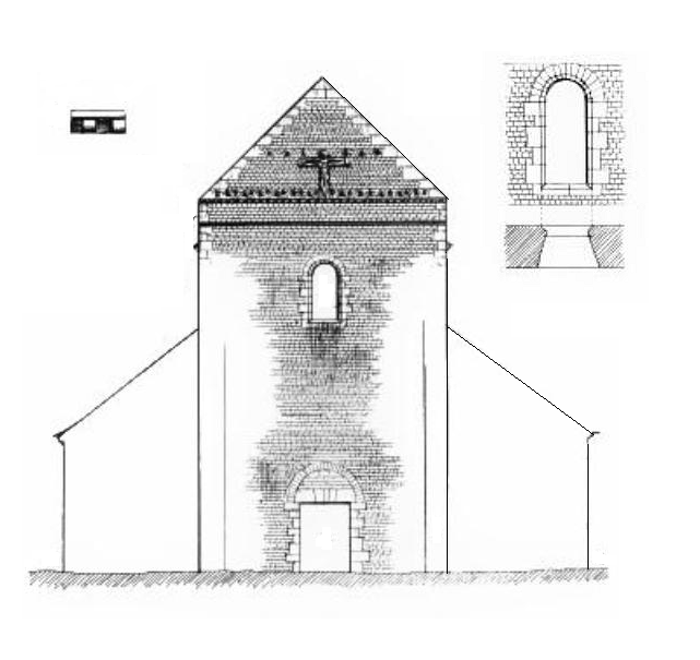 Ancienne façade occidentale, détail de la corniche et détails de la fenêtre.